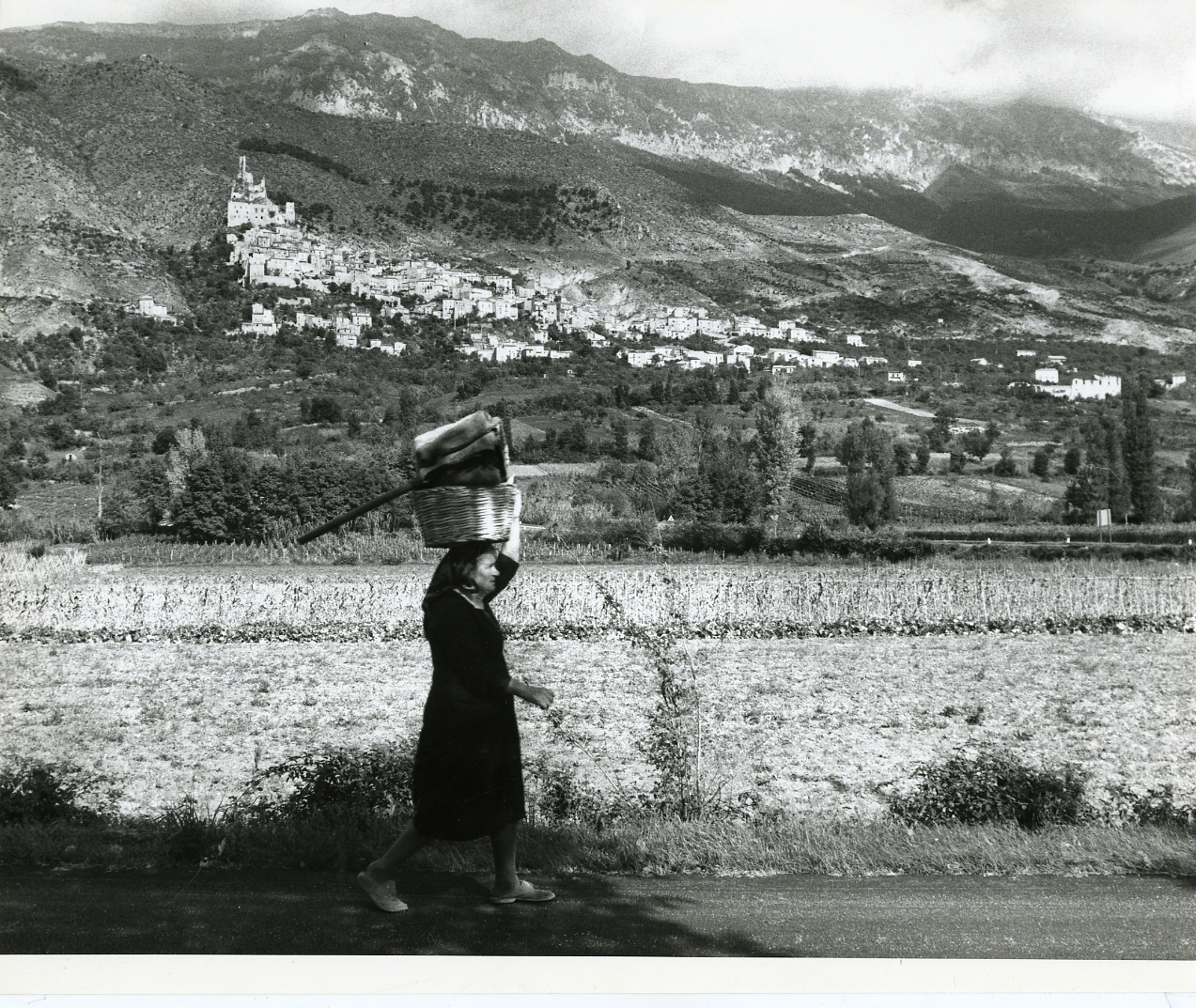 Abruzzo. Particolare della facciata di una chiesa non identificata. Strada di Roccacasale. Paesaggio agreste con contadina. Serie fotografica : Italia, 1967 / Paolo Monti. - Stampe: 3 : Positivo b/n, gelatina bromuro d'argento/ carta, 24x30. - ((Al verso delle stampe manoscritto numero di negativo corrispondente: 954/8, 15459. Sul coperchio della scatola, manoscritto a pennarello: "Abruzzi, Marche, Umbria". - Occasione: Documentazione per la pubblicazione: Abruzzo e Molise, TOURING CLUB ITALIANO, Milano, 1970. - Fonte: Monografia di Touring Club